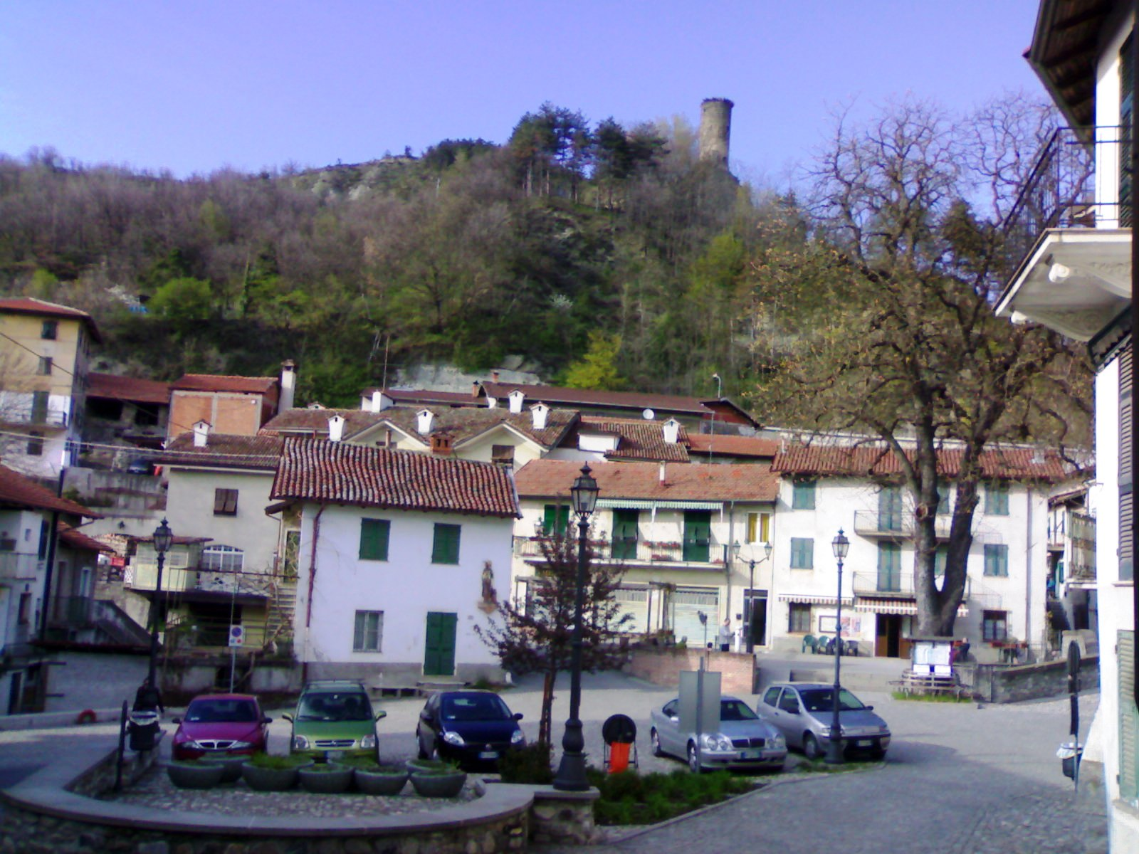 vista di Grondona (AL) in valle Spinti